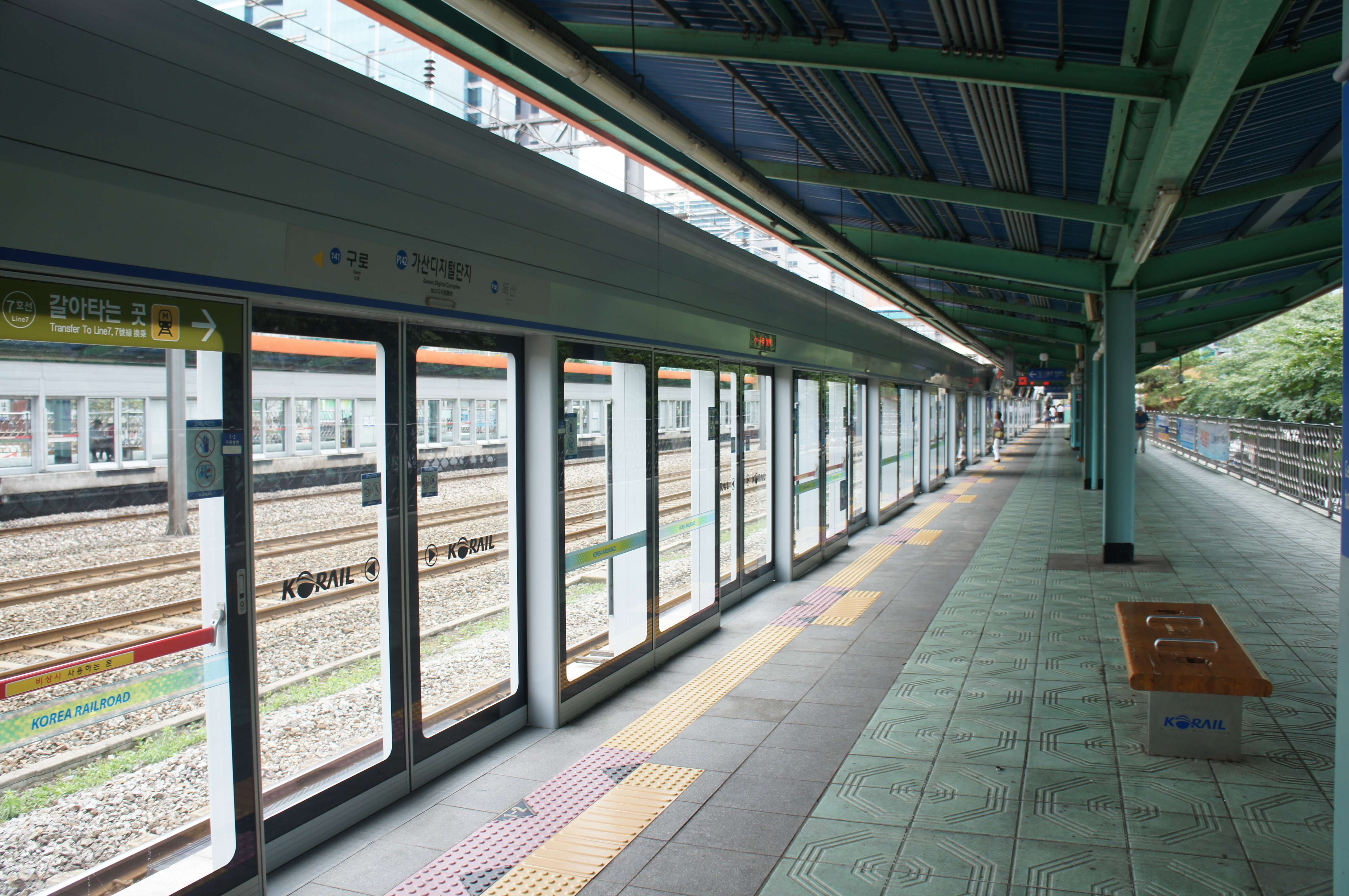 1호선(경부선) 가산디지털단지역 역명판